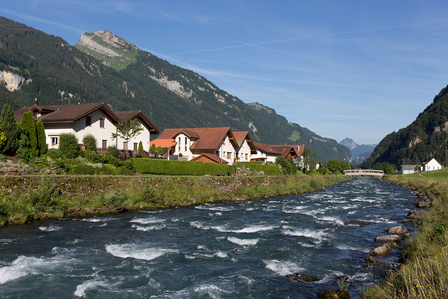 Die Muota